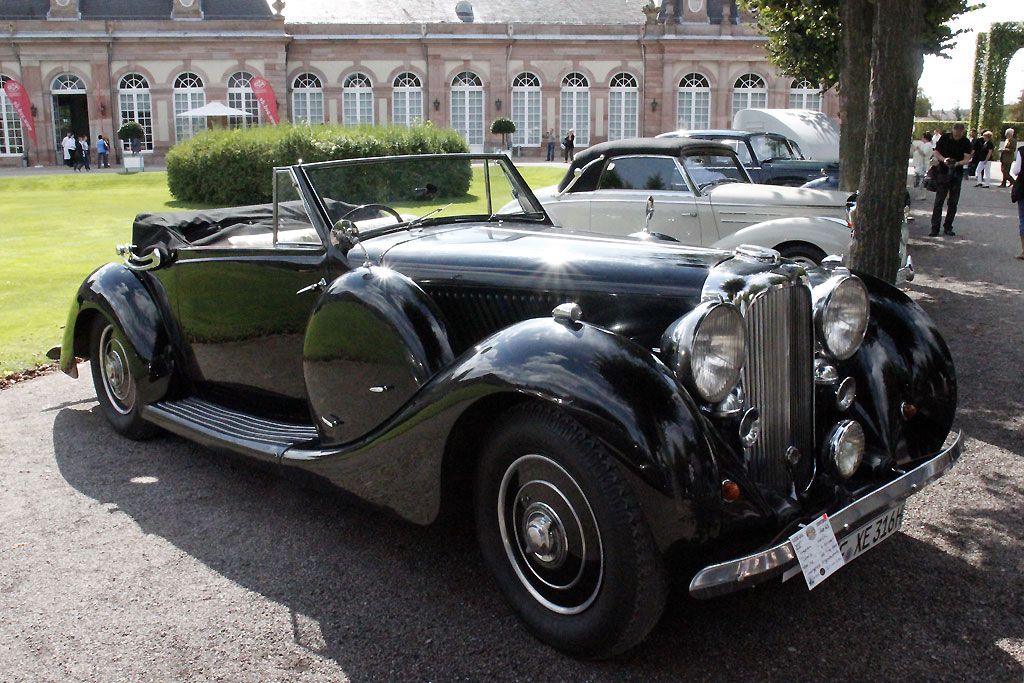 1938 Lagonda LG6 DHC Cabrio_IMG_1003